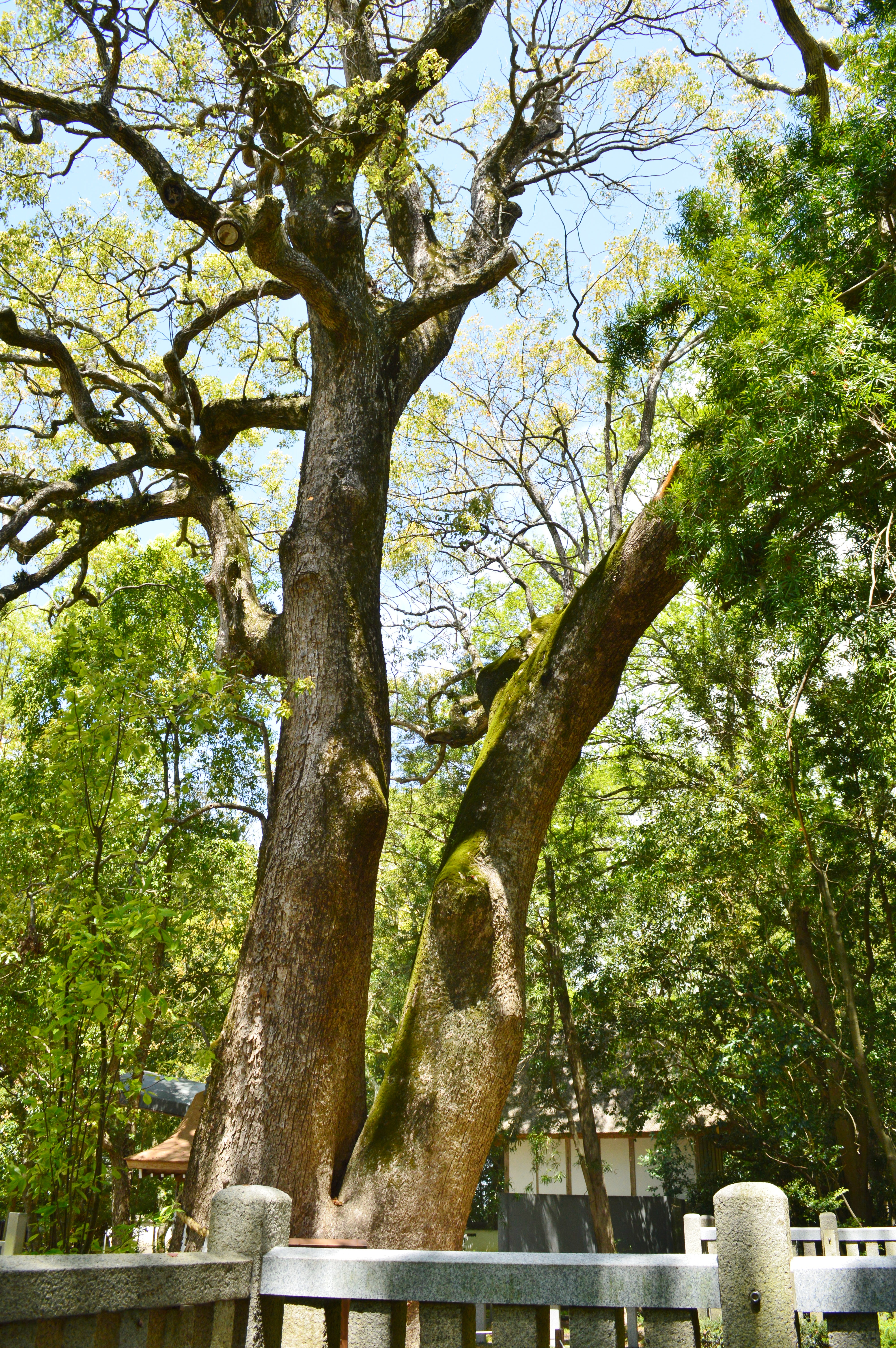 伊弉諾神宮 クス Nikon D3200